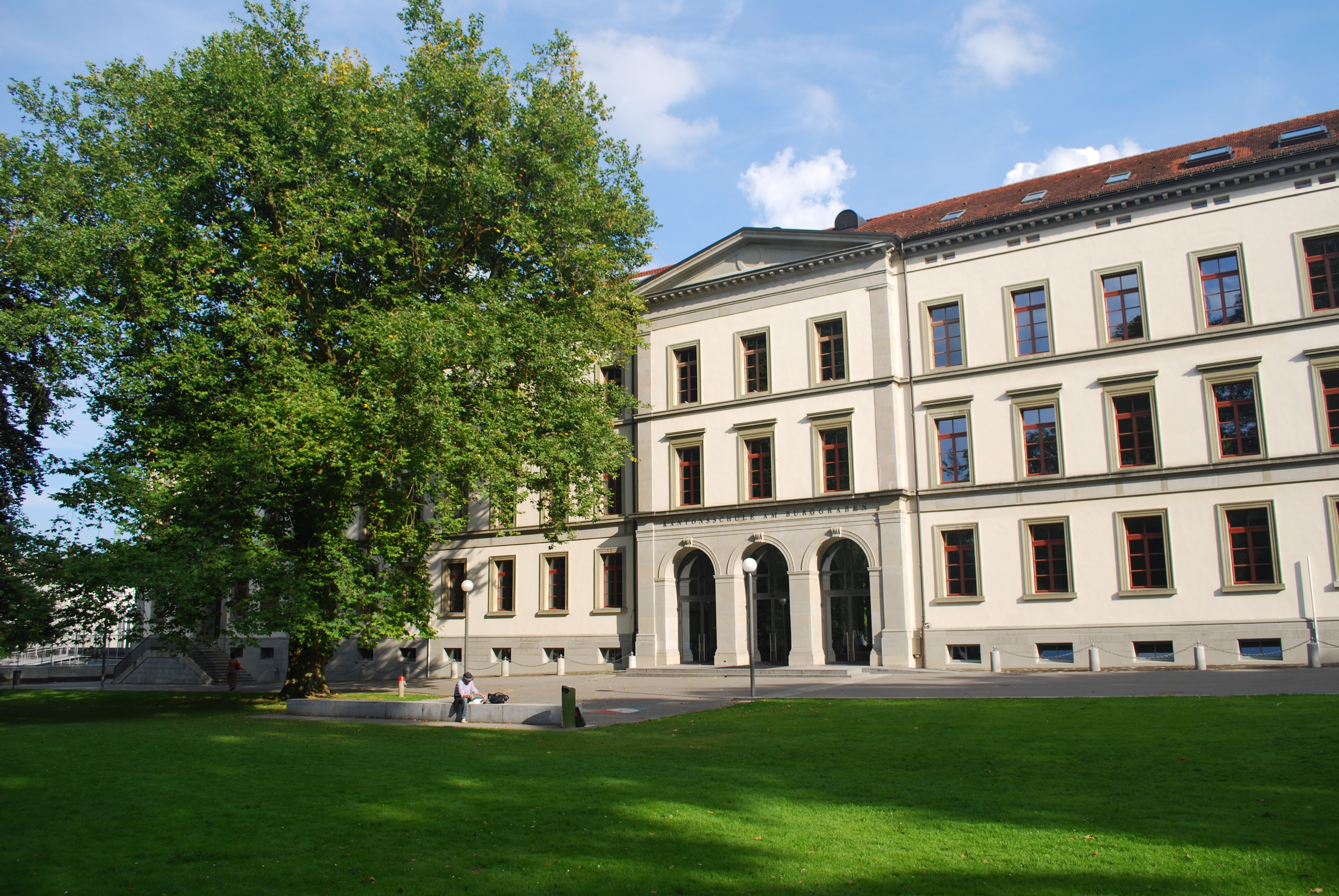 Kantonsschule am Burggraben, Fassade des Baus von Felix Wilhelm Kubly